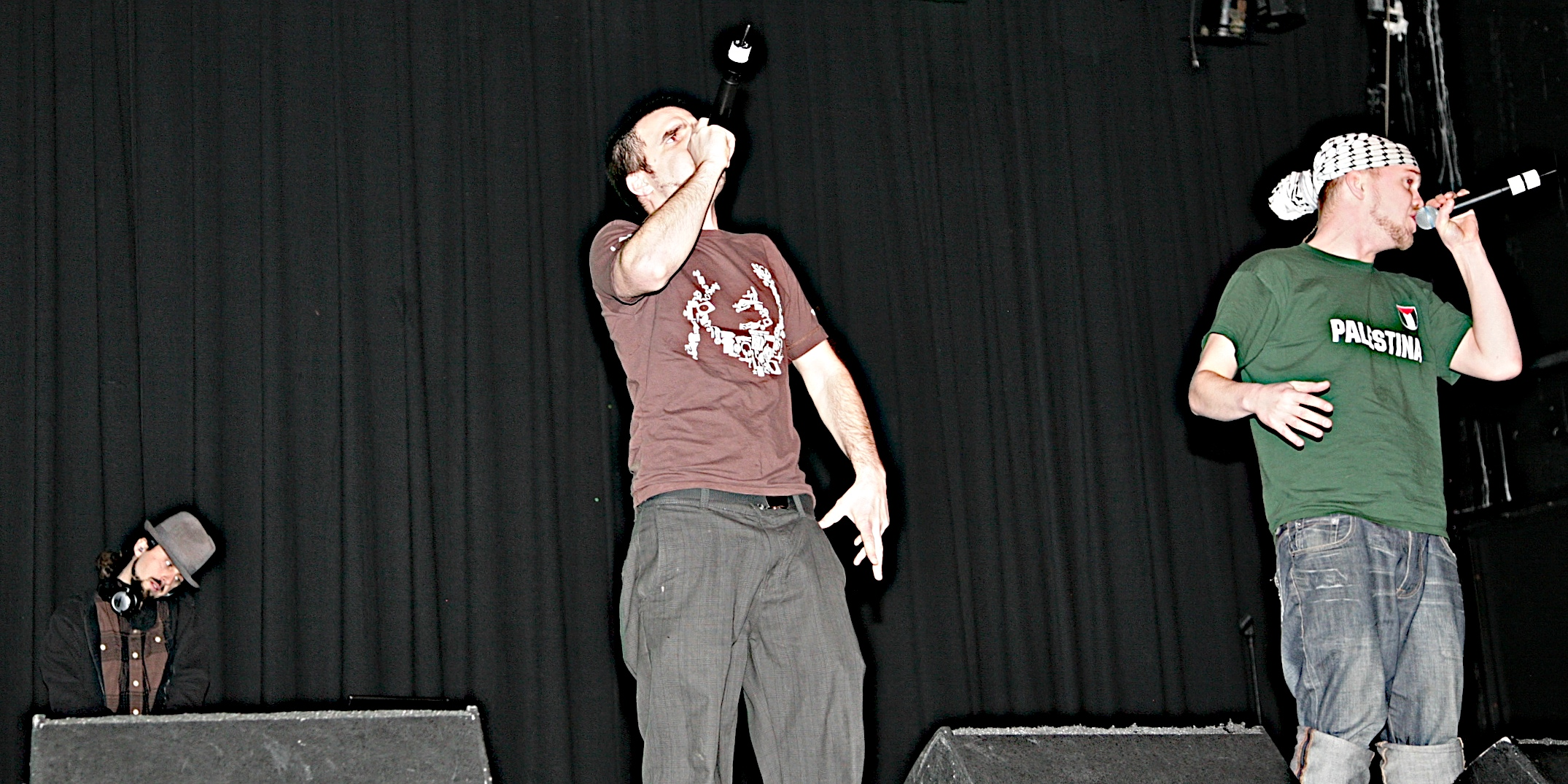 Gatas Parlament